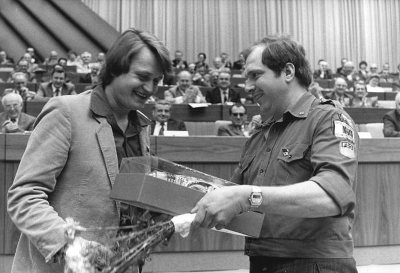 ADN-ZB-Mittelstädt-15.4.81-cb-Berlin: X. Parteitag- Unter langanhaltendem Beifall der Delegierten und Gäste überreichte Peter Kaiser (r.), Leiter der Jugendbrigade "Heinz Kiefert" im VEB Tiefbau Berlin, seinem Kollegen Heinz Wudy, Jugendbrigadier aus dem VEB Straßen- und Tiefbaukombinat Suhl in der FDJ-Initiative Berlin, für die tatkräftige Mitarbeit seines Kollektivs am Bauprogramm Berlin ein symbolisches Geschenk."